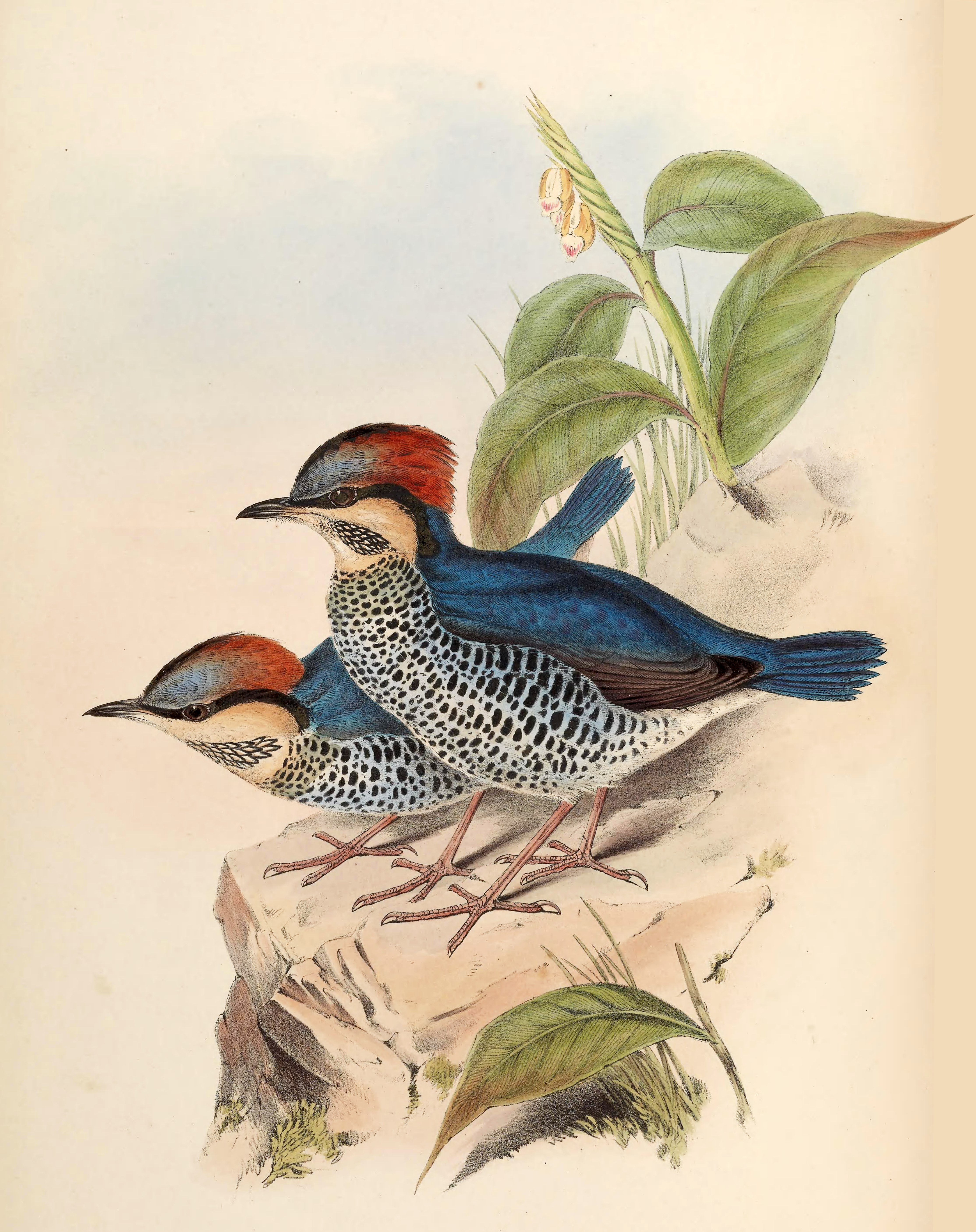 Blue Pitta Pitta cyanea Blyth